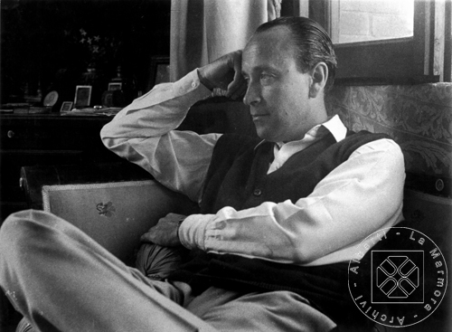 Ritratto di Guglielmo Alberti in Casa Bracci